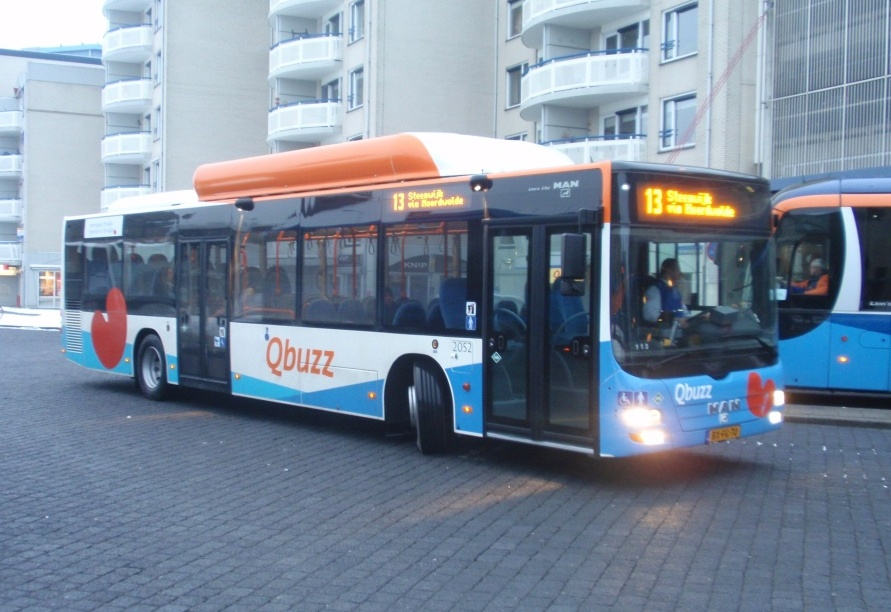 MAN Lion´s City CNG Aardgasbus van Qbuzz Zuid-Oost Fryslan. Drachten, van Knobelsdorffplein